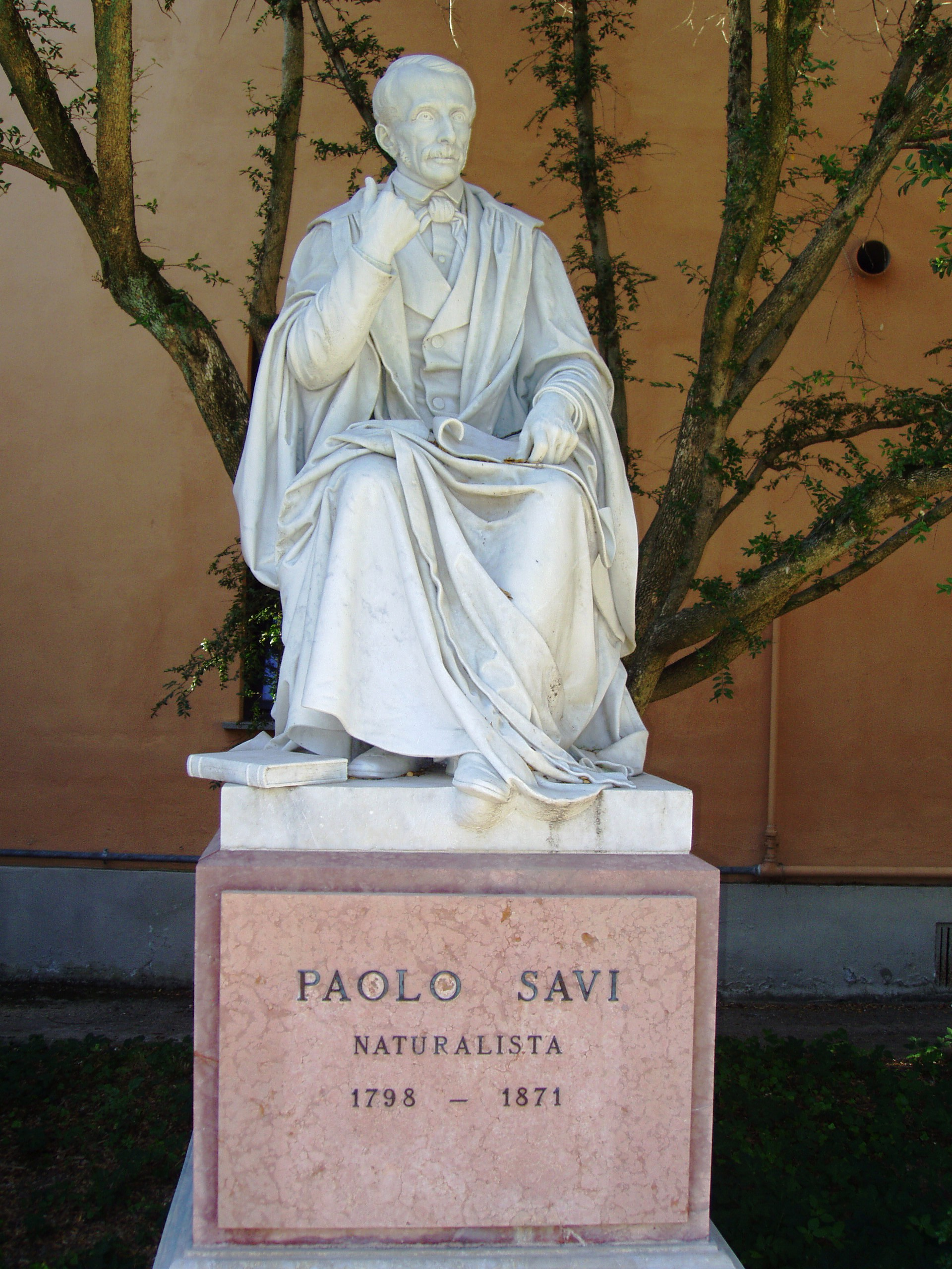 Vincenzo Consani (1818-1888), Monument to Italian naturalist Paolo Savi (1798-1871). Orto botanico, Pisa, Italy.